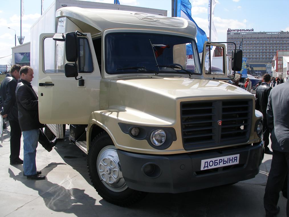 ГАЗ-3307 - GAZ-3307